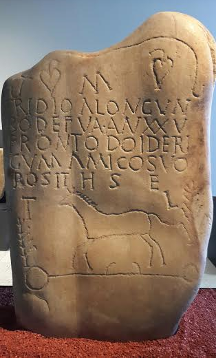 Lapida vadiniense de Tridio Alongun. AE 1976, 307 = IRPLeon 282 = ERPLeon 391 = ECantabra 110: M(onumentum) / Tridio Alongun / Bode(ri) f(ilio) Va(diniensi) / an(norum) XXV / Fronto Doideri/gum amico suo / pos(u)it h(ic) s(itus) e(st) / t(erra) l(evis)